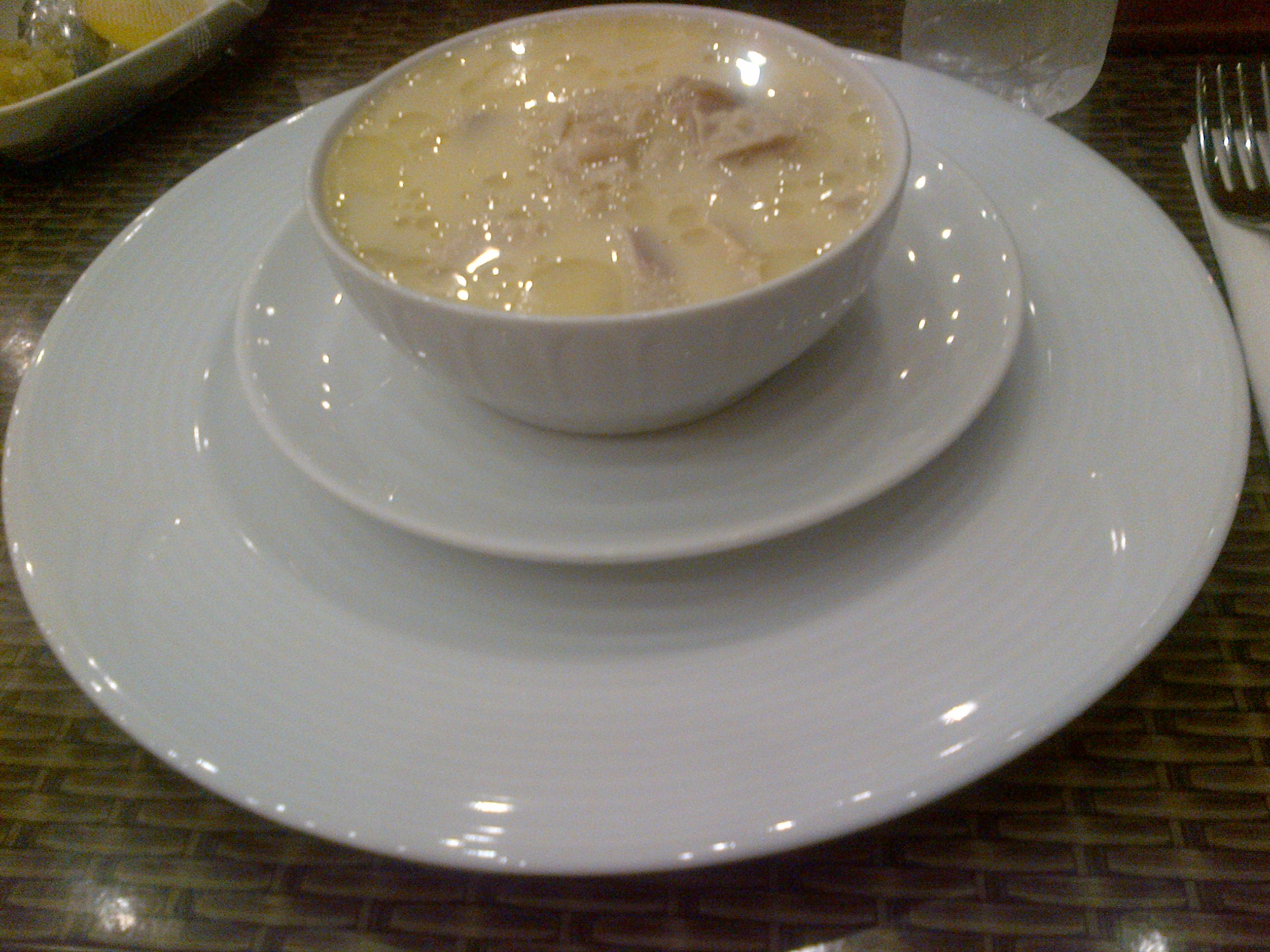 Tuzlama, una varieta de işkembe çorbası.